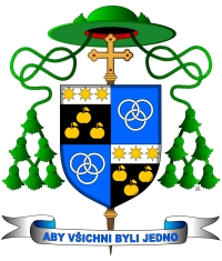 Znak Kardinála M. Vlka